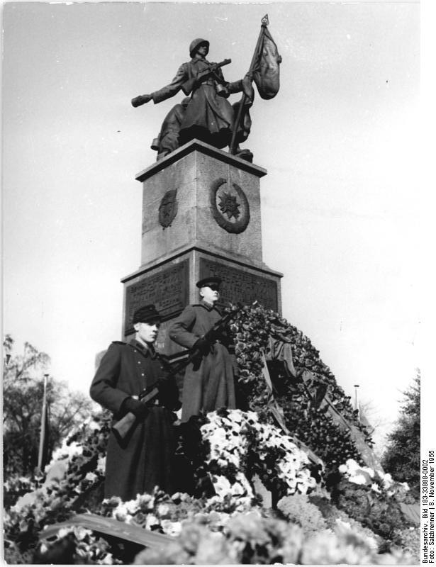 Dresden, Sowjetisches Ehrenmal Zentralbild Salzbrenner 8.11.1955 Zum 38. Jahrestag der großen Sozialistischen Oktoberrevolution Zahlreiche Delegationen legten am 38. Jahrestag der Großen Sozialistischen Oktoberrevolution am sowjetischen Ehrenmal in Dresden Kränze nieder. UBz: Das blumengeschmückte Ehrenmal.